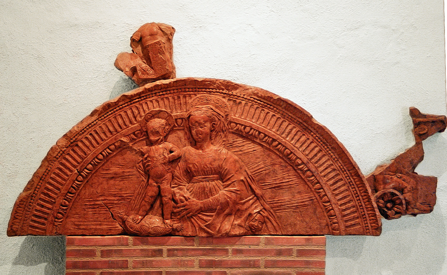 Die Visegráder Madonna, ausgestellt in einem Raum der teilrekonstruierten Schloßkirche von Visegrád. Mátyás Király Múzeum (König-Matthias-Museum), Visegrád.